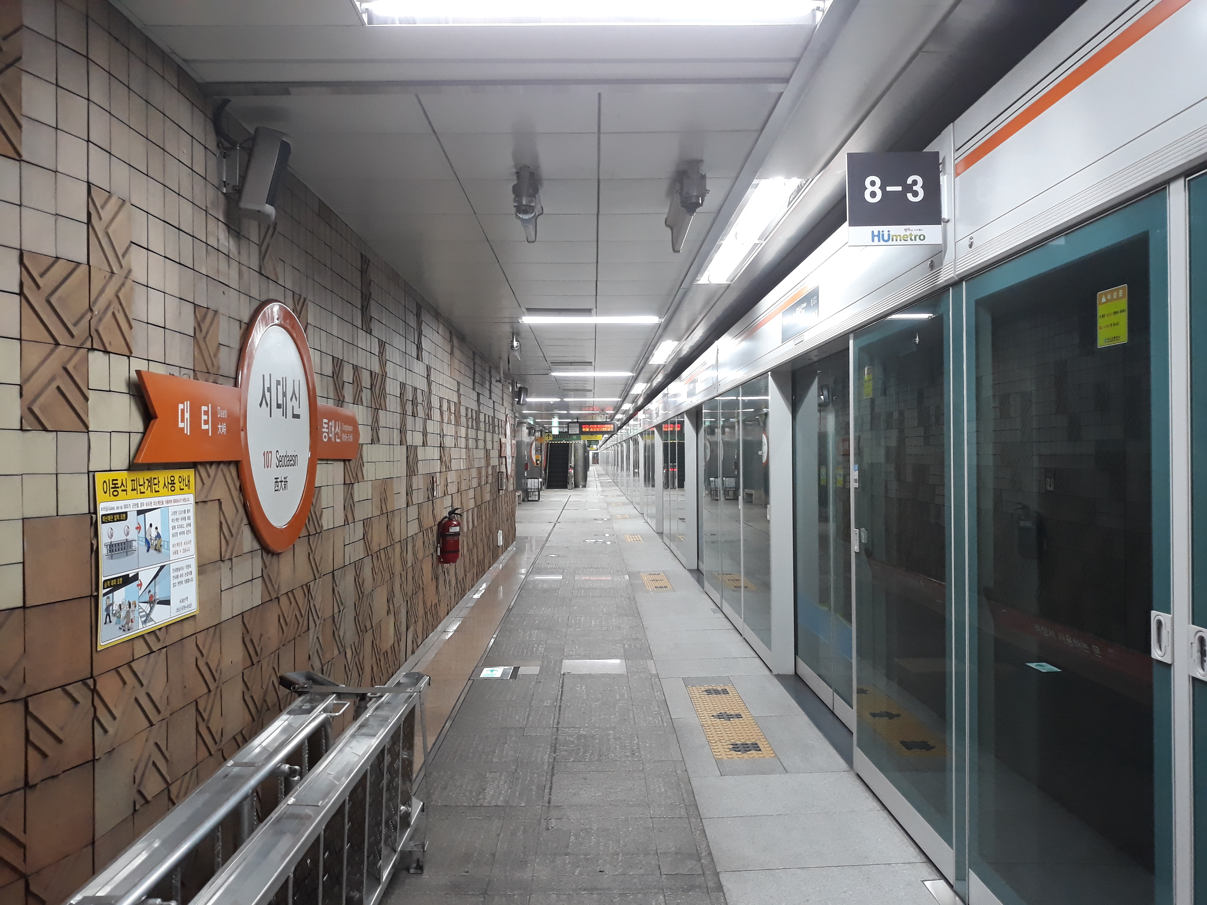 부산 도시철도 1호선 서대신역 노포 방면 승강장